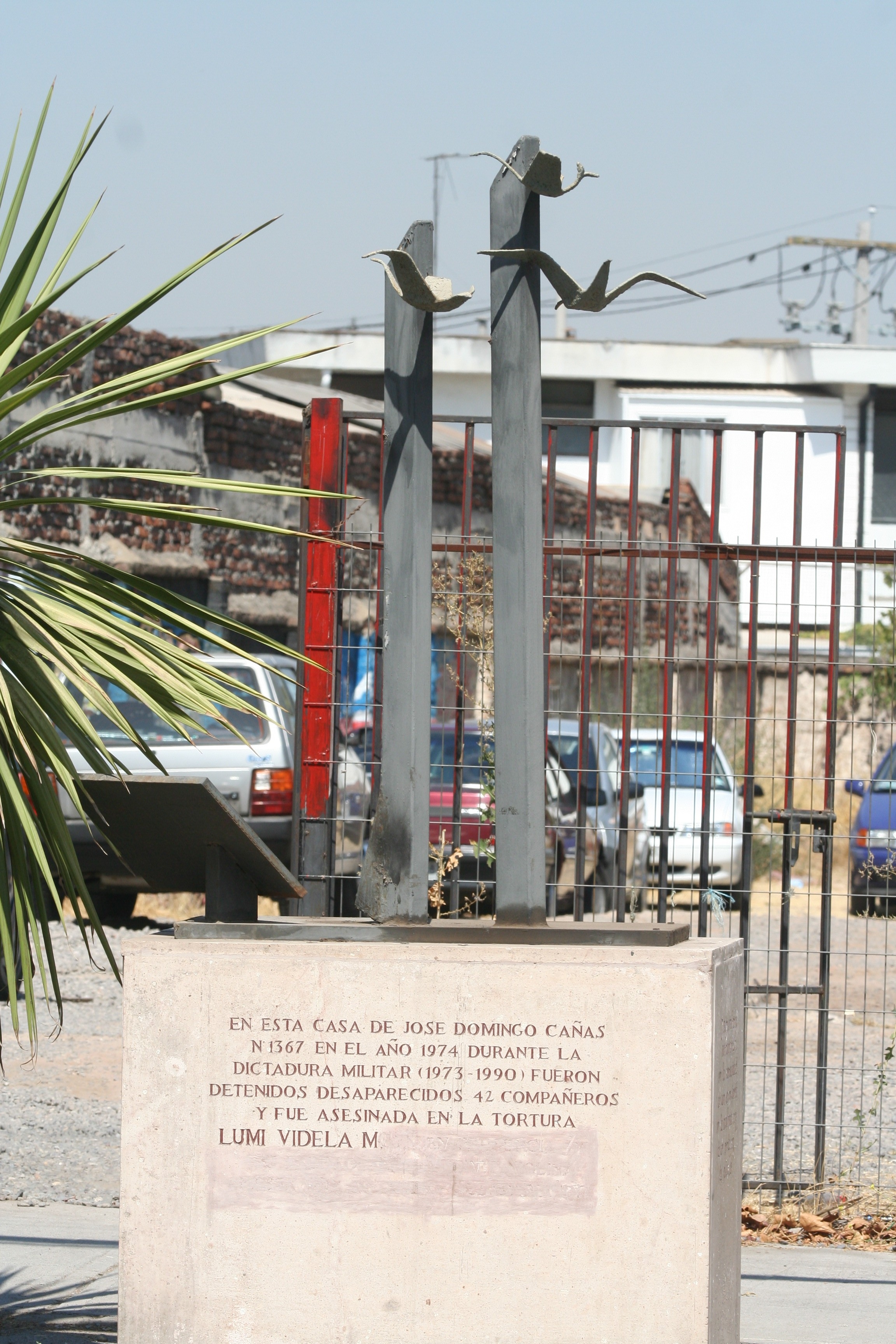 Memorial conmemorativo de la violación de los DDHH en Chile durante el régimen de Pinochet